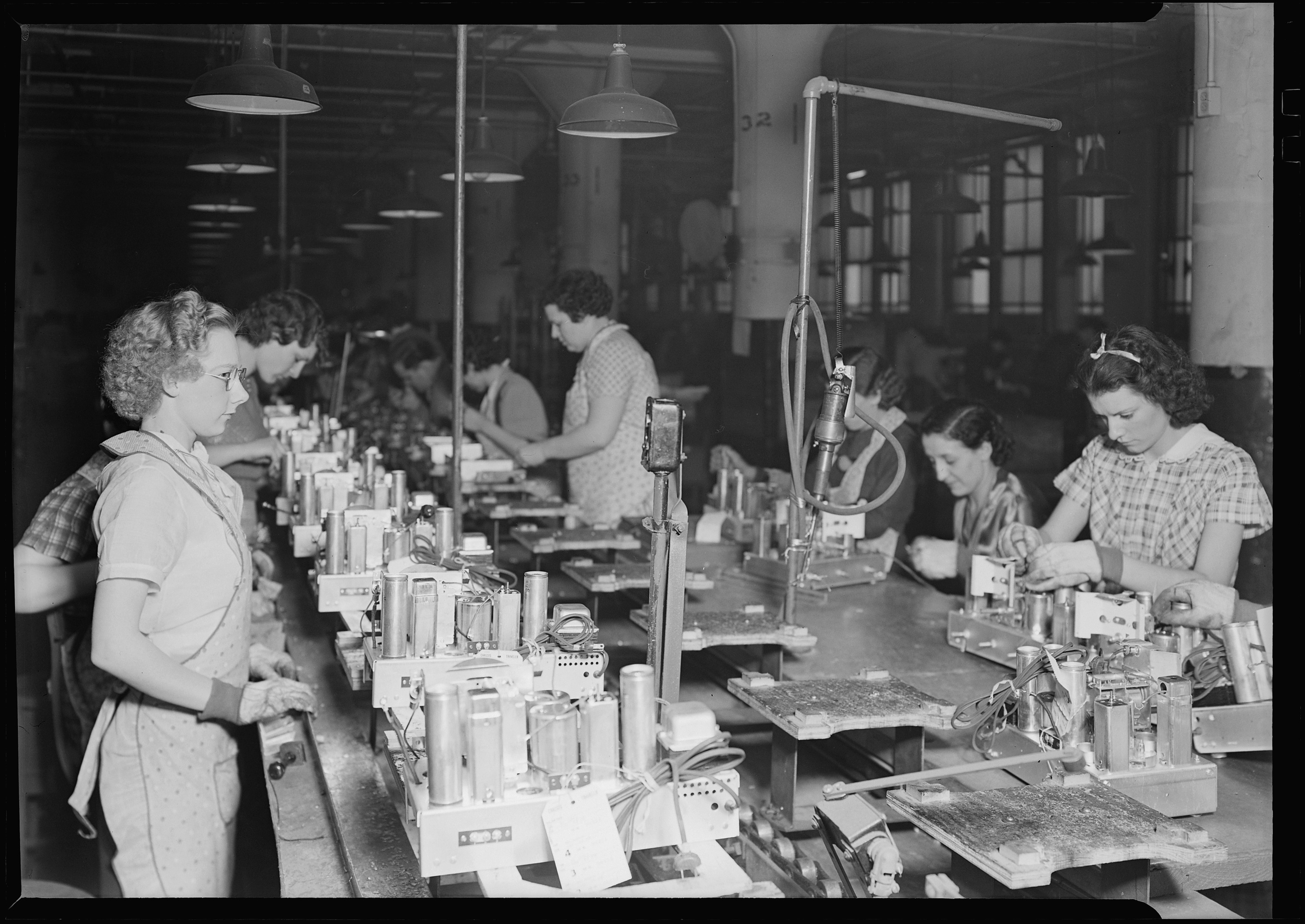 Scope and content